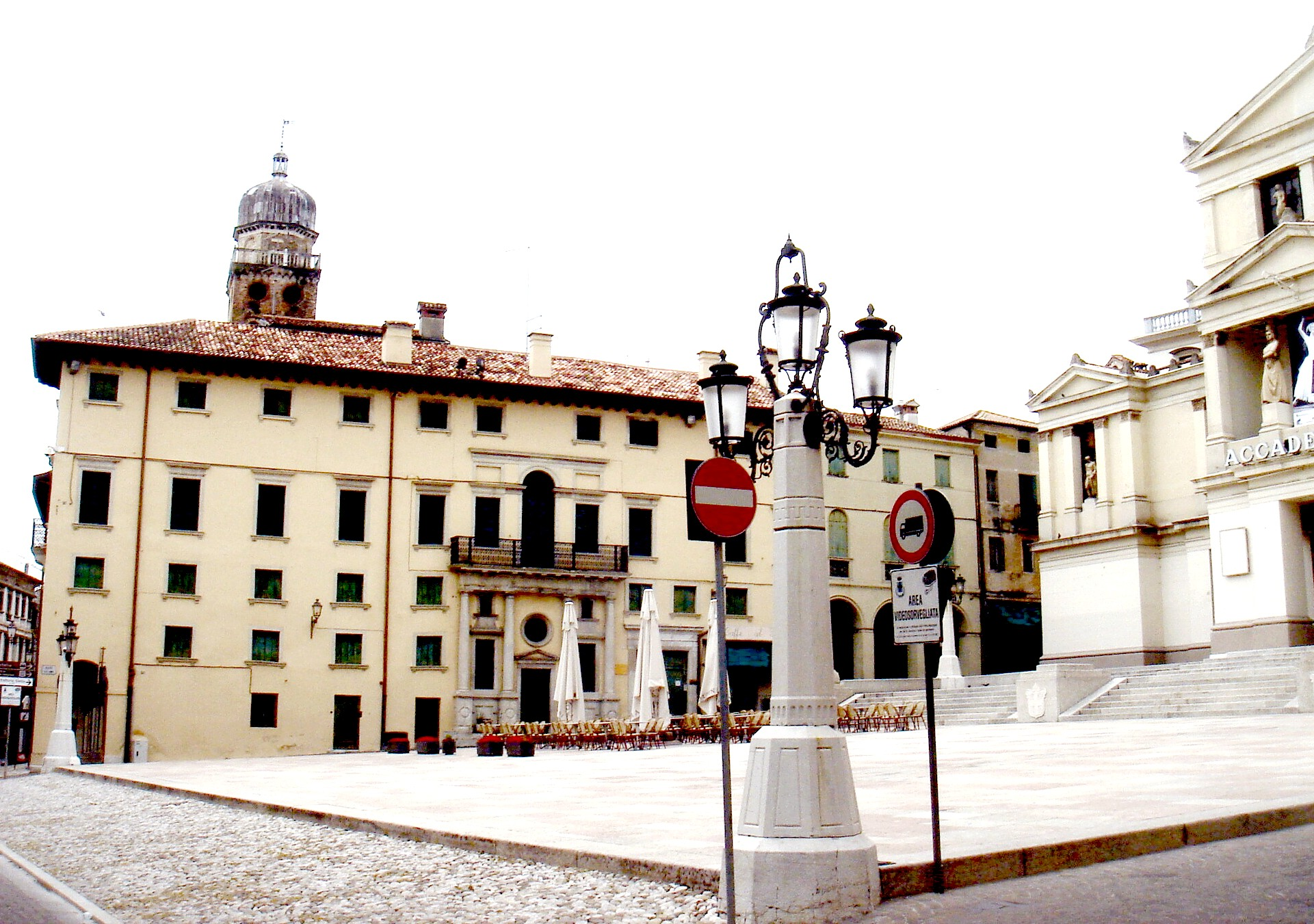 Conegliano (Treviso): veduta di Piazza Cima con la facciata di Palazzo Da Collo e il relativo oratorio (XVI secolo) e il Teatro Accademia (XIX secolo) a destra.